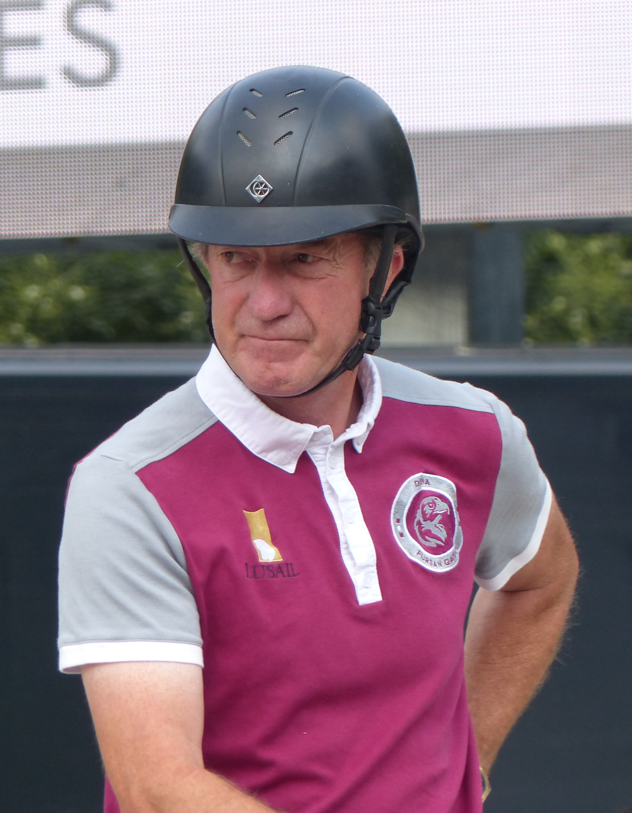 Le cavalier anglais Michaël Whitaker au Paris Eiffel Jumping 2018.